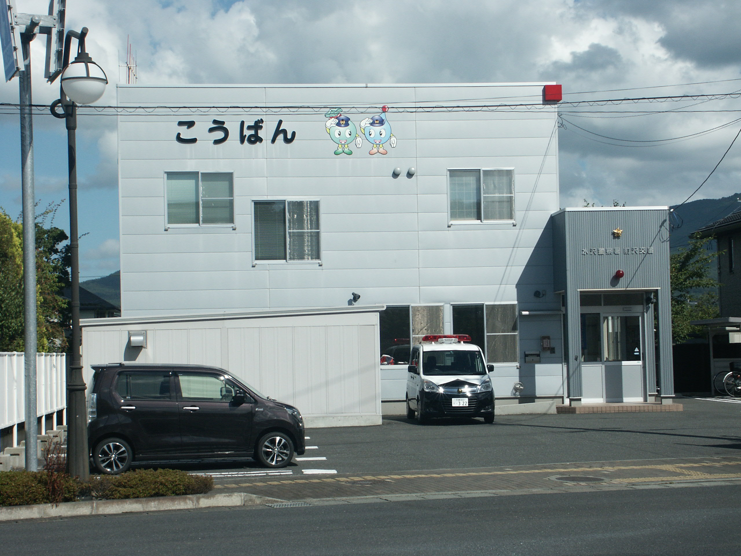 水沢警察署前沢交番